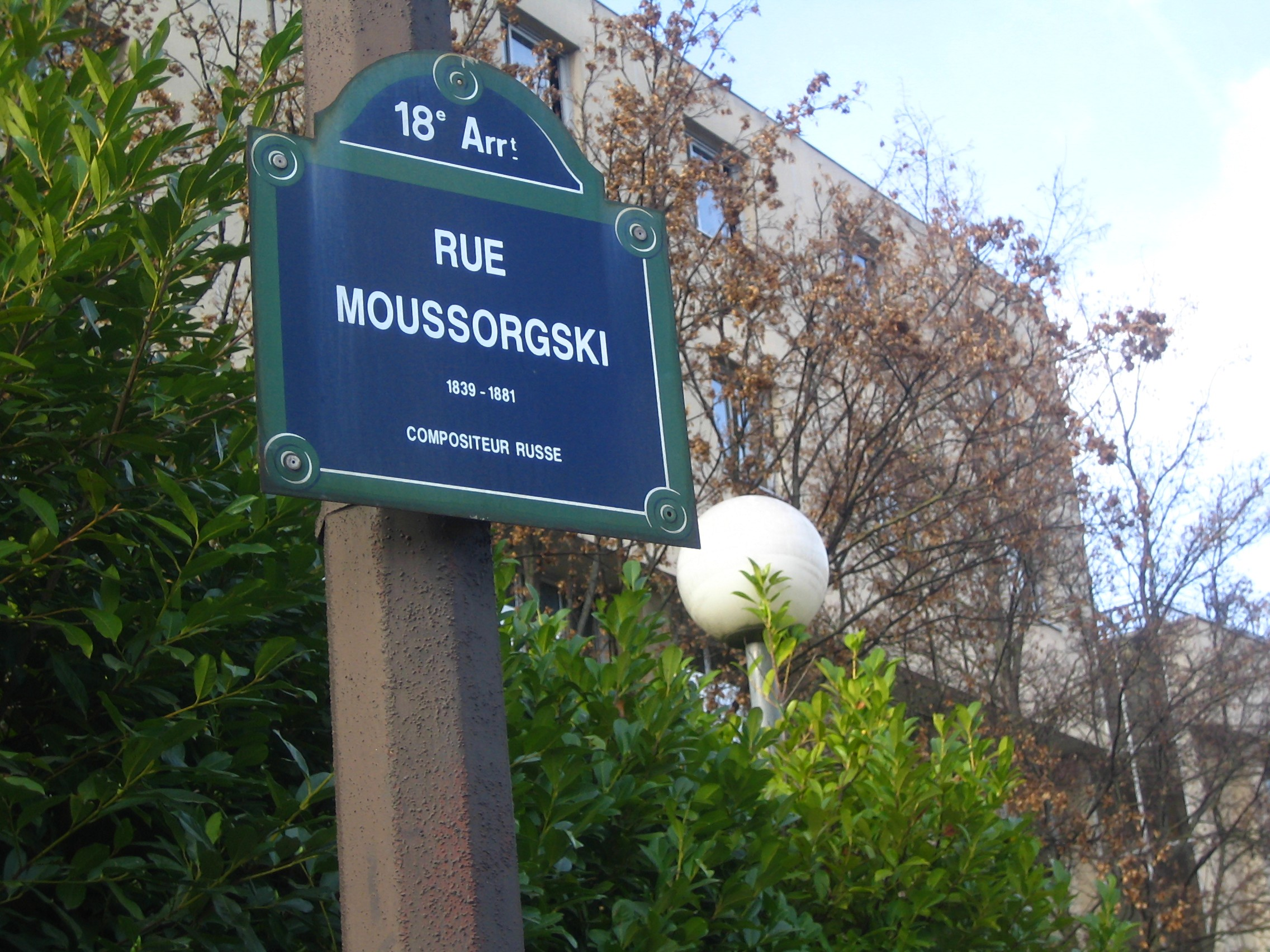 La rue Moussorgski est située à Paris dans le 18éme arrondissement.